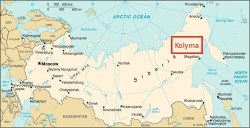 Carte de Russie indiquant l'emplacement de la région de la Kolyma